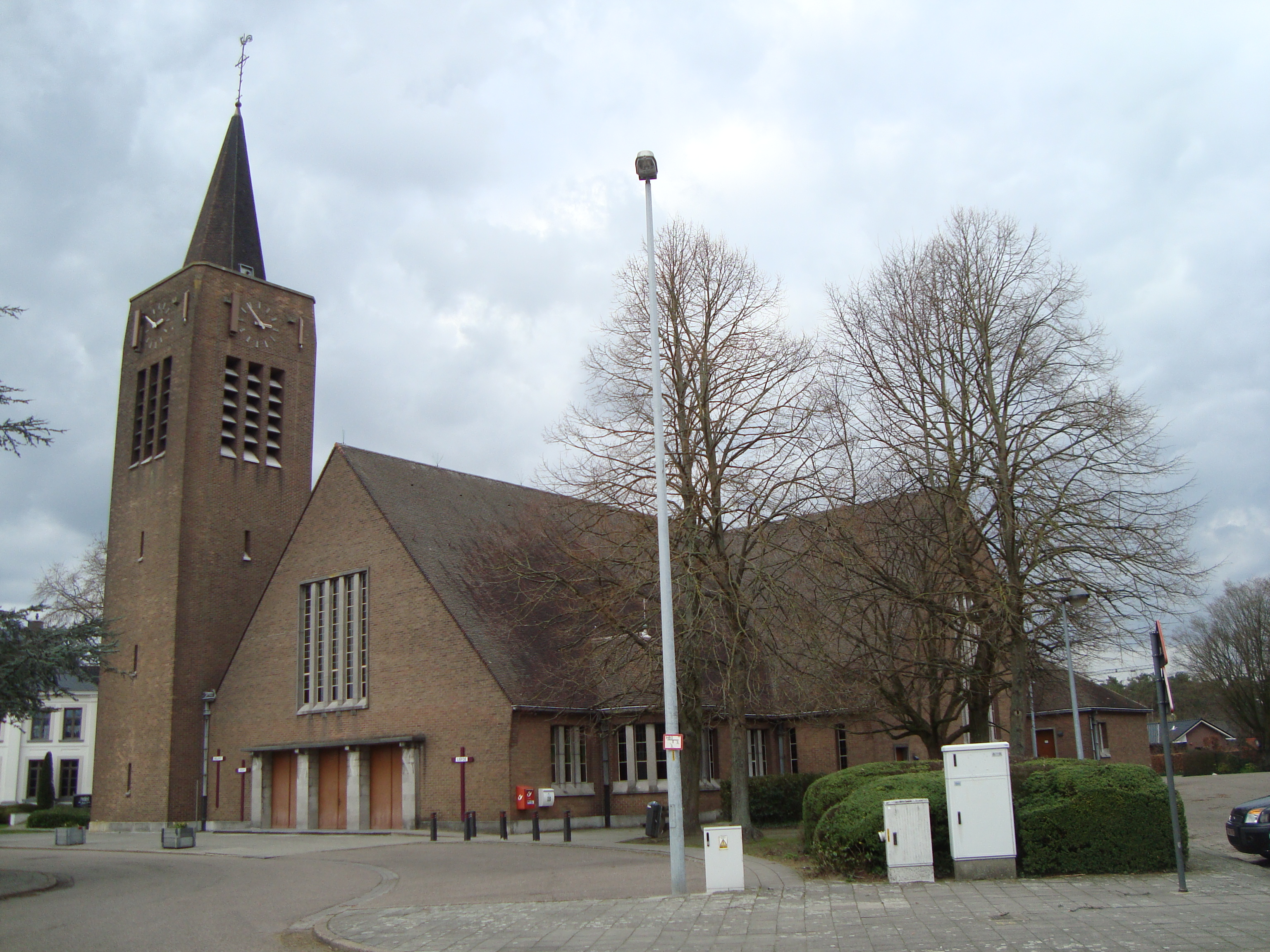 Vooraanzicht van de Sint-Odradakerk te Millegem, gemeente Mol. De foto is genomen op 19 maart 2019.